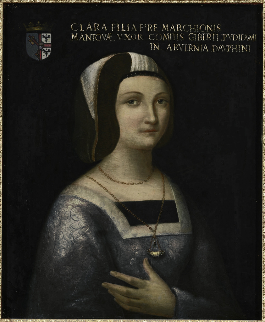 Портрет Кьяры Гонзага (1464—1503), принцессы Мантуанской, в замужестве графини де Монпансье, кисти неизвестного.